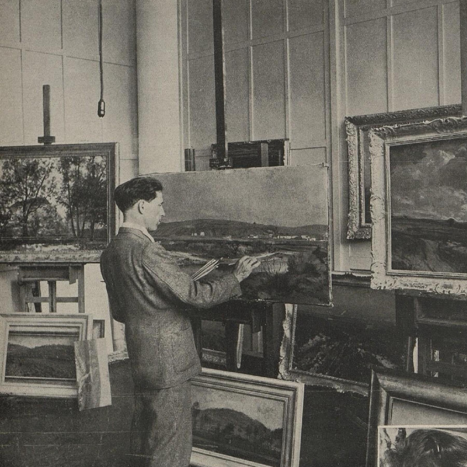 Karel Hofman (1906-1998), český akademický malíř